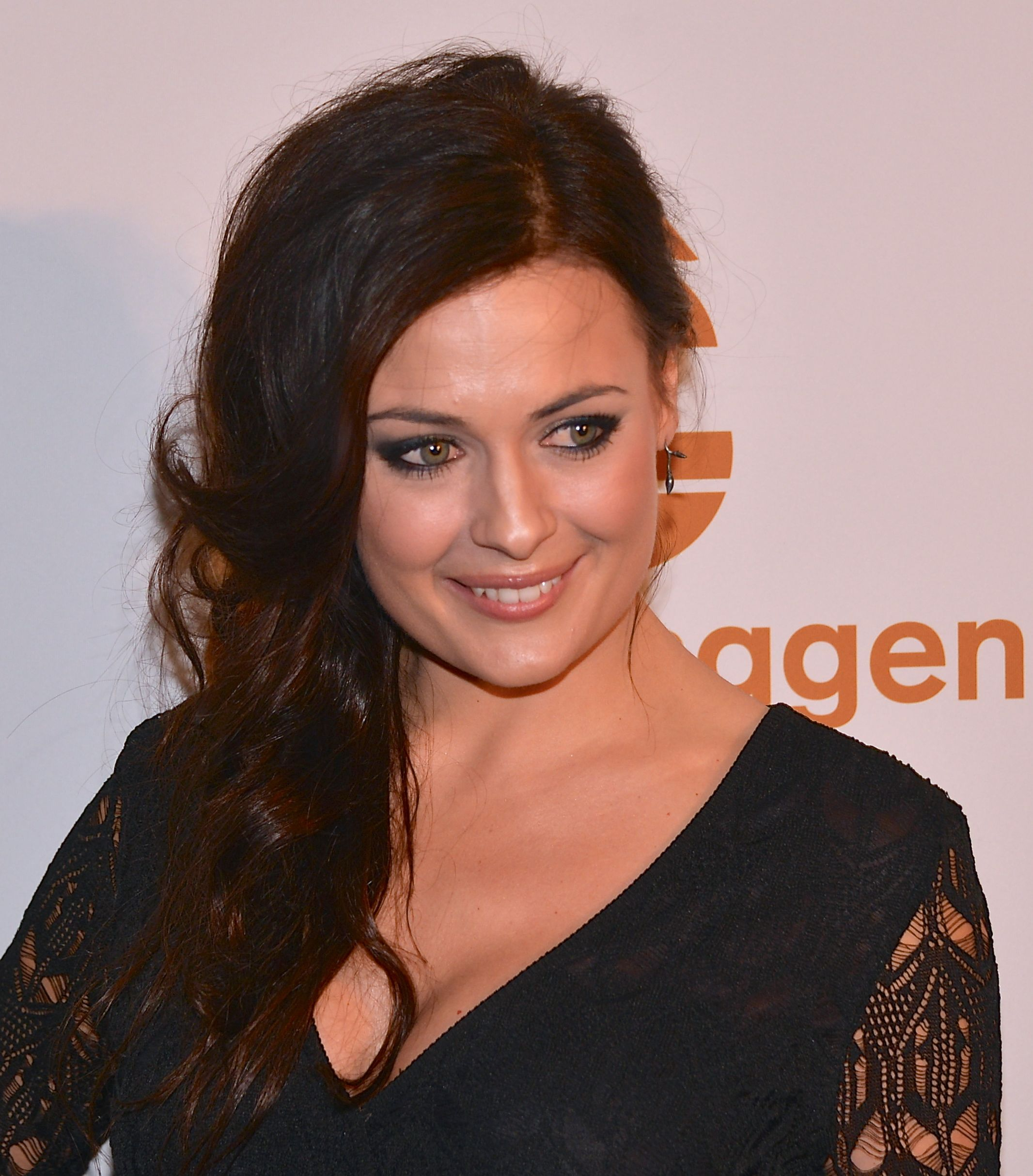 Susanne Thorson på Guldbaggegalan den 21 januari 2013.